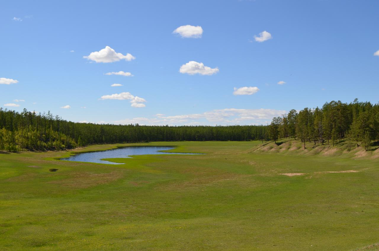 Безымянный алас к югу от озера Майя и к западу от села Петровка